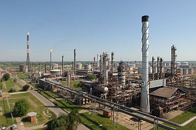 Rafinerija ulja u Modriči